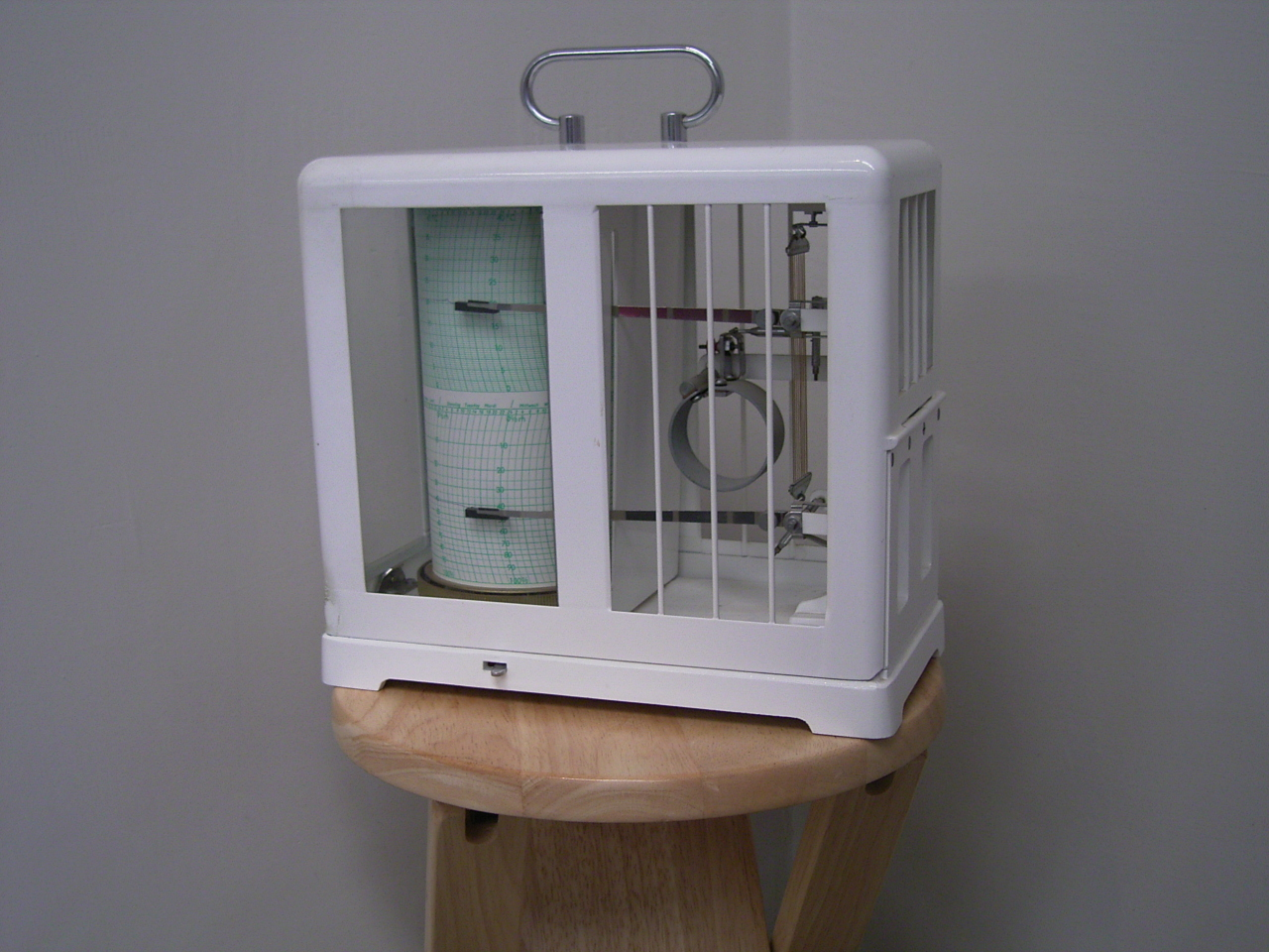 Thermohygrograph beim Museumseinsatz Fotograph oder Zeichner: Benutzer:Hafenbar